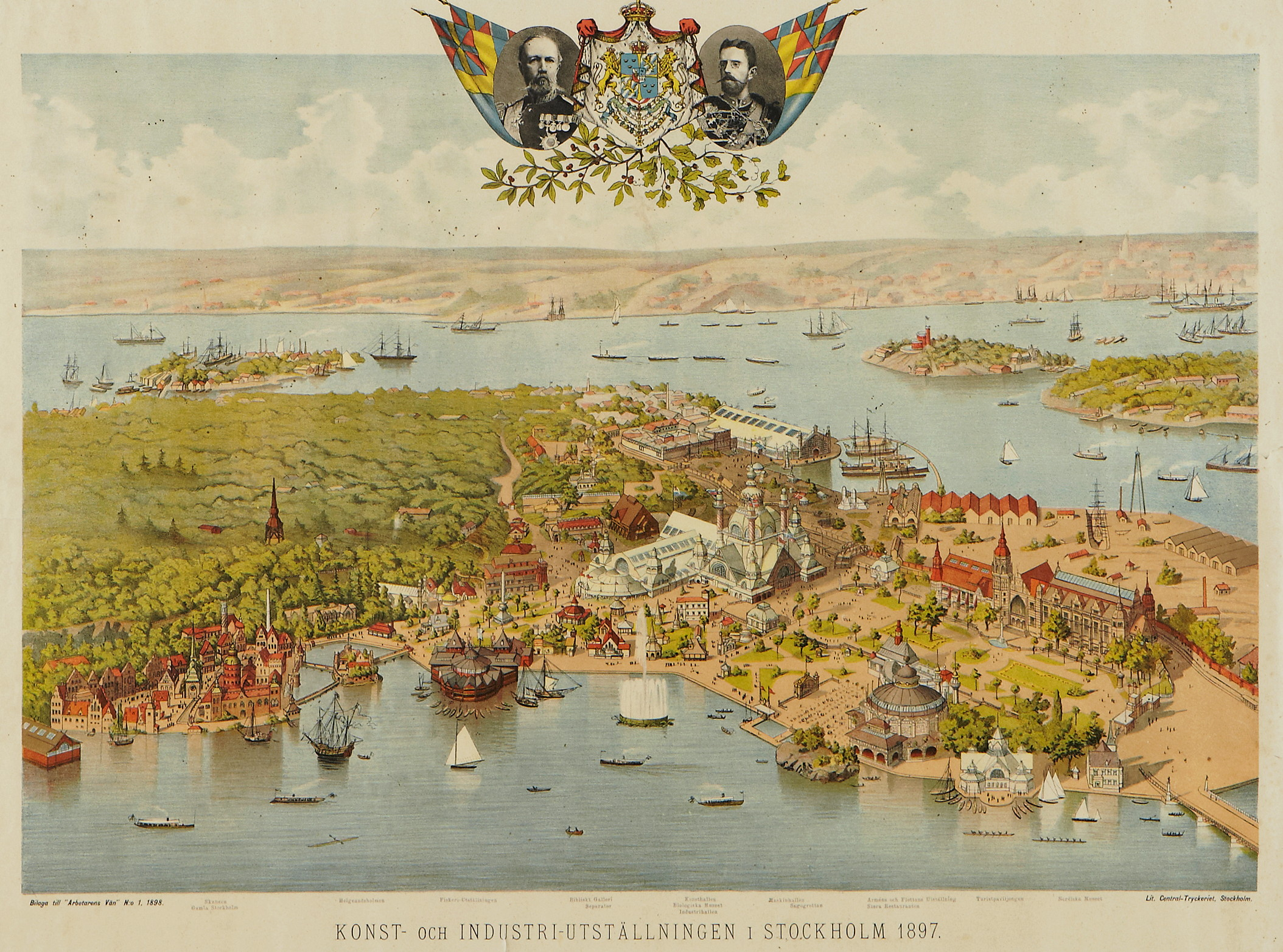 Allmenna konst och industriutstellning 1897, perspektivritning över utställningsområdet